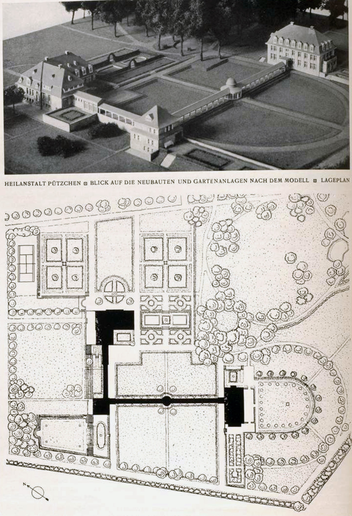 Bruno Paul, Heilanstalt Pützchen bei Bonn, Blick auf die Neubauten und Gartenanlagen nach dem Modell